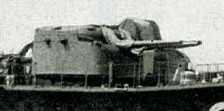 Torretta della IJN Destroyer Ikazuchi